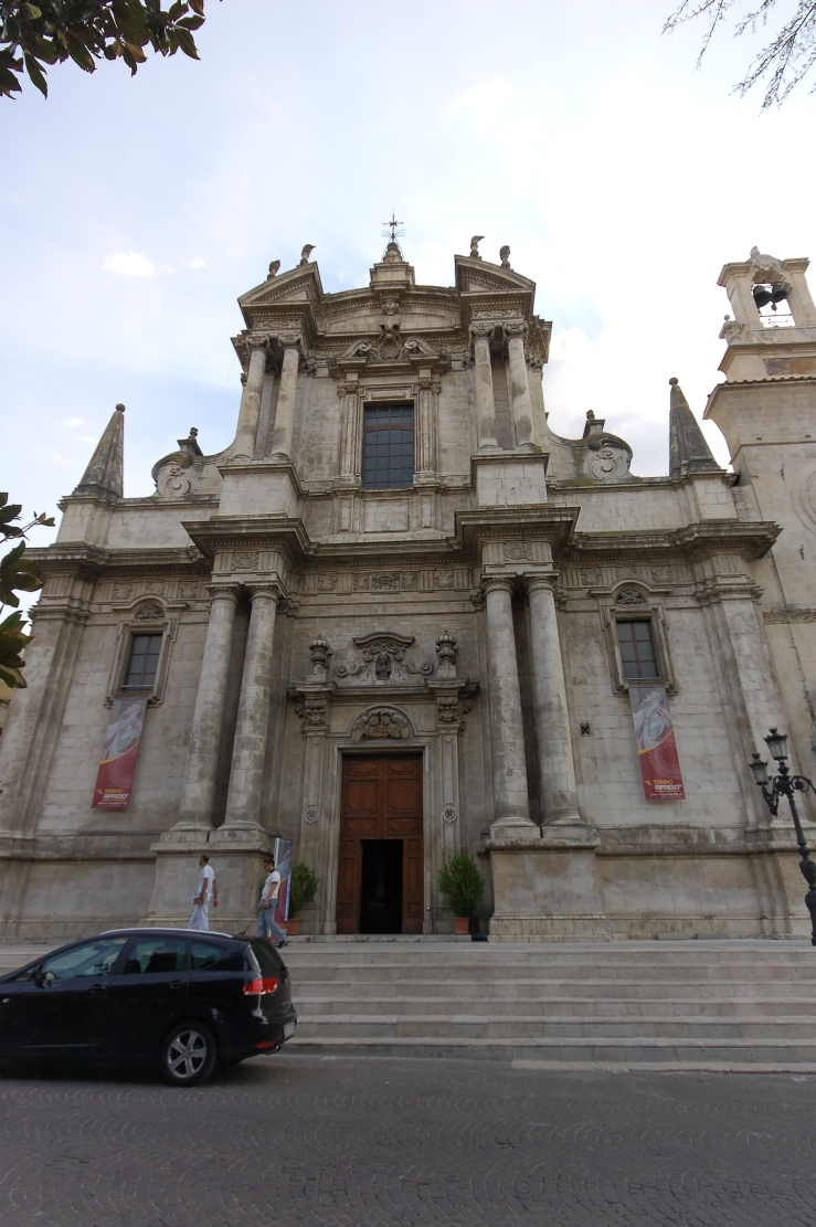 Sulmona 2011